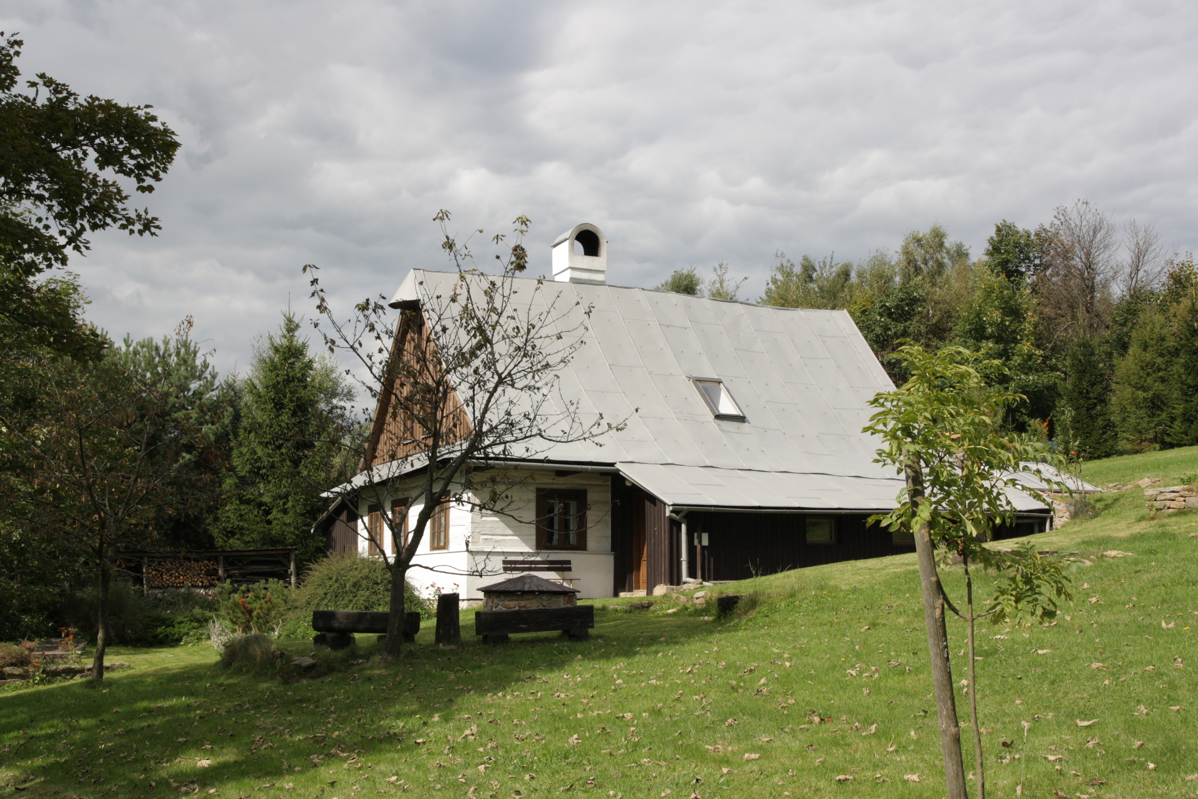 Koníkov (Věcov) - stavení čp. 19.